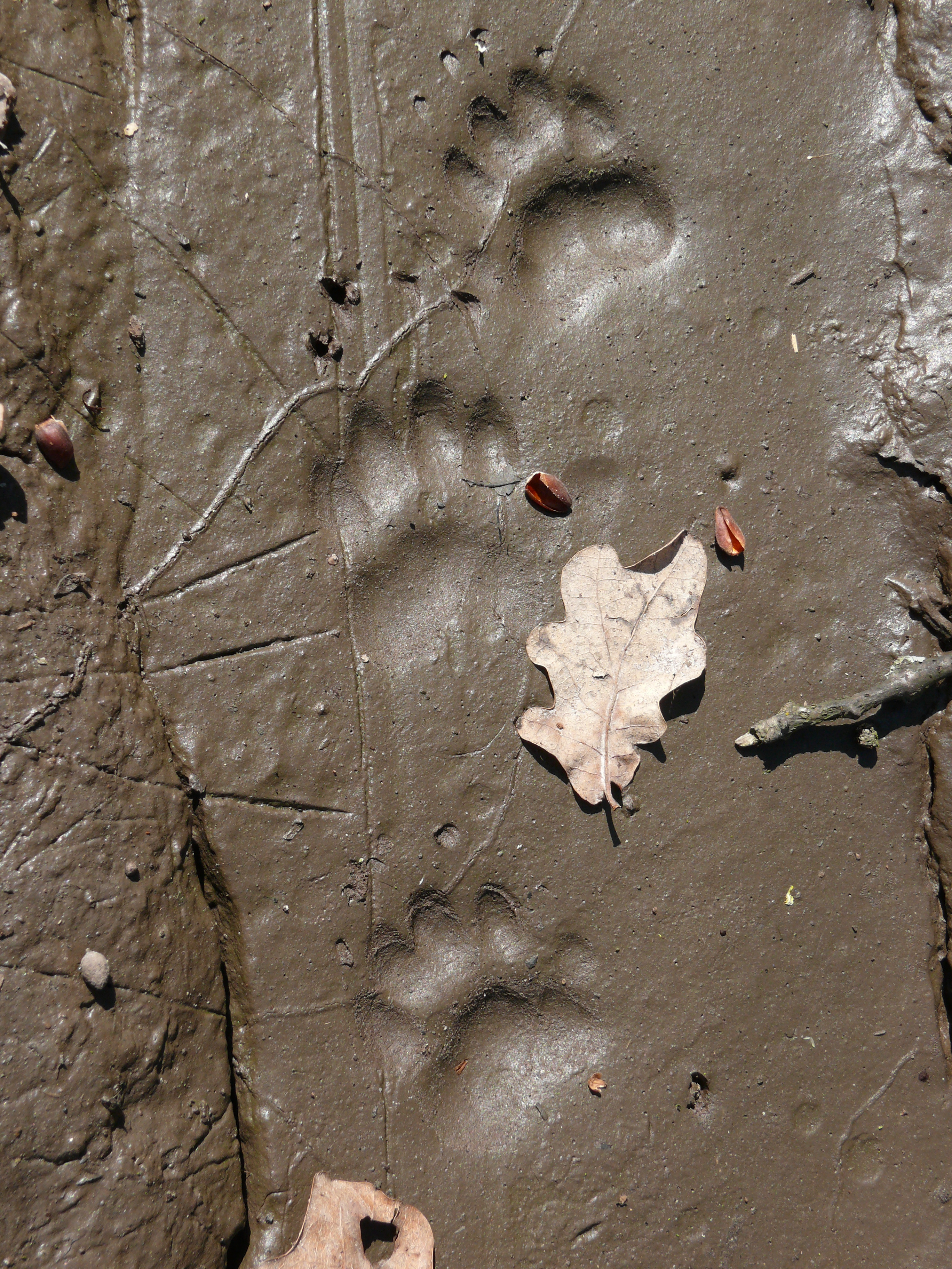 «Гомільшанські ліси», Зміївський район с. Коробів Хутір, с. Задонецьке, с. Гомольша. Первомайський район с. Нижньобишків, с. Гайдари